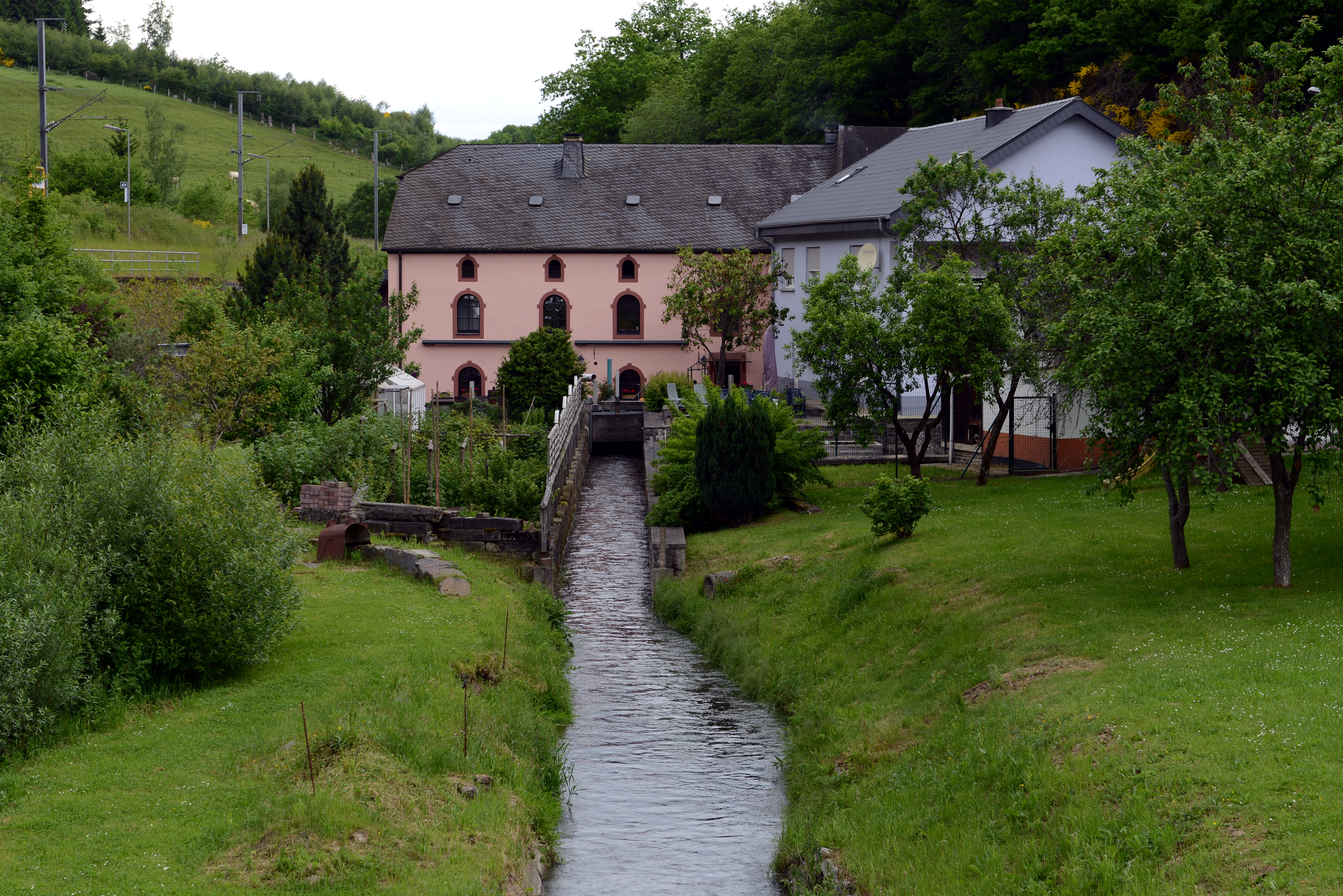 Déi fréier Millen an d'Millebaach vun der Maulesmillen.